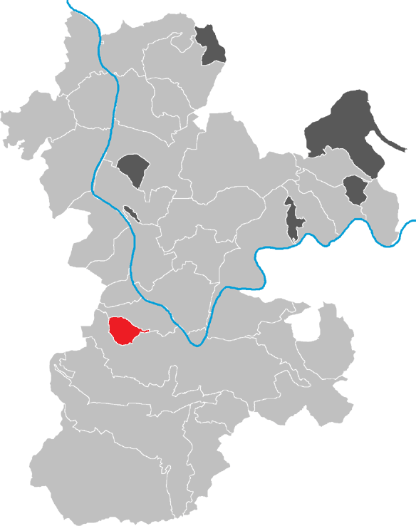 Karte von Rüdenau im Kreis Miltenberg, Bayern, Deutschland.